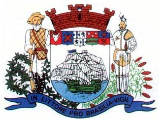 Brasão de São Francisco do Sul